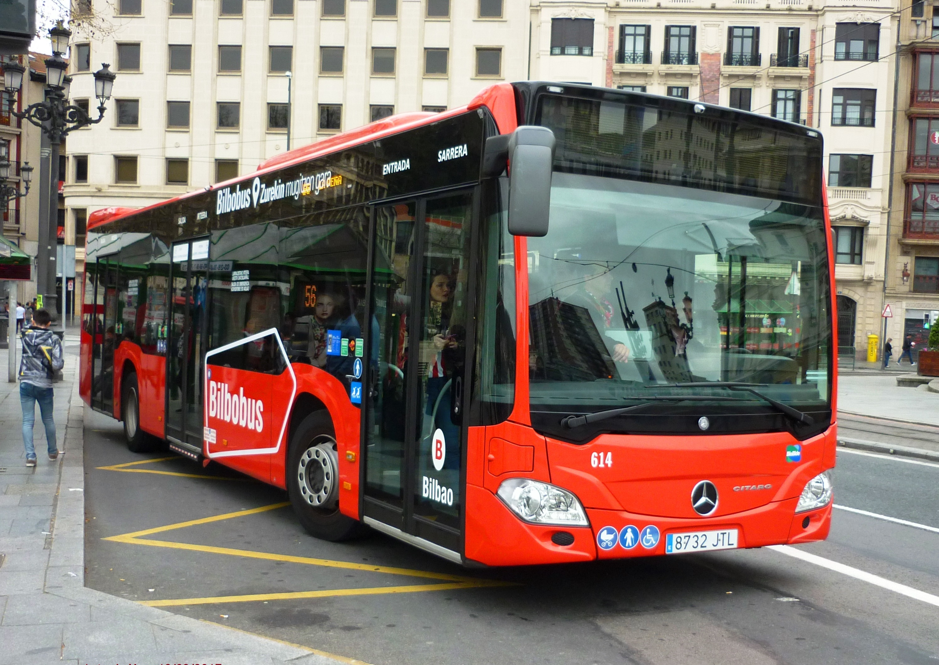 614_Biobide